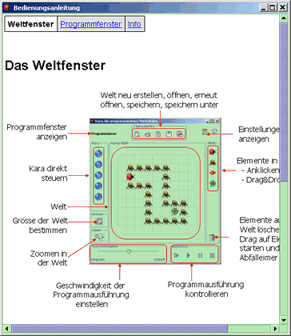 Kara Weltenbildschirm erklärt